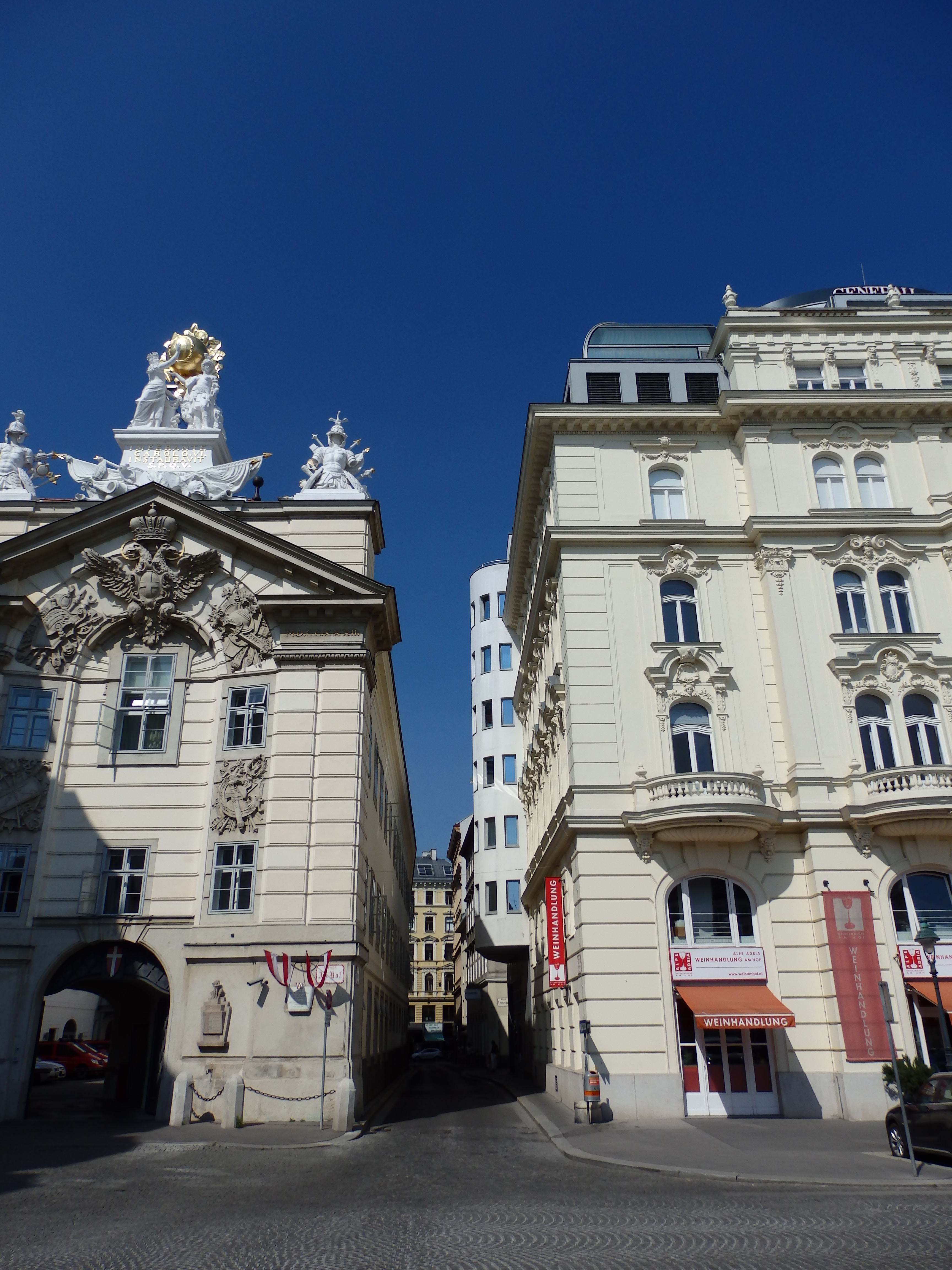 Färbergasse vom Hof aus gesehen, Wien-Innere Stadt